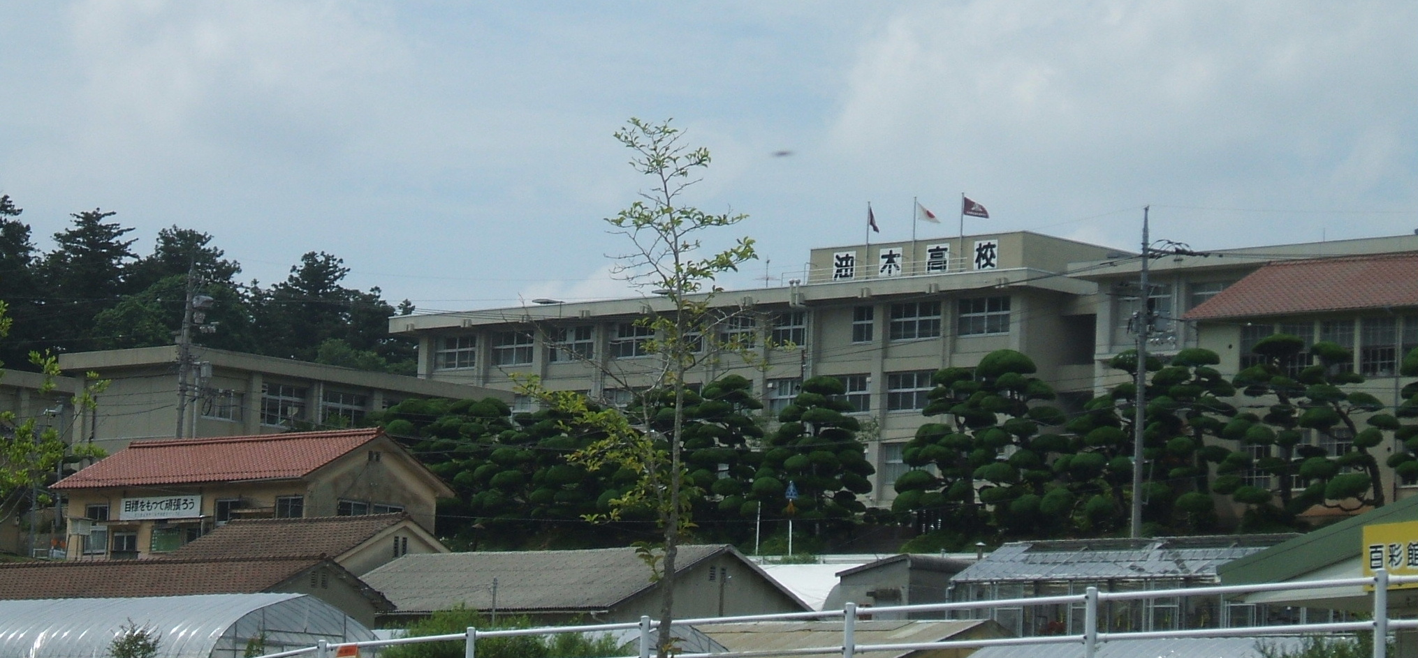 広島県神石高原町油木にある広島県立油木高等学校の外観